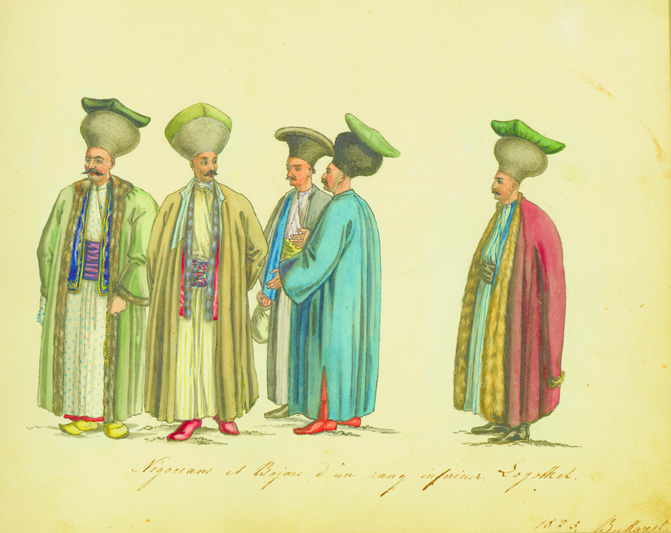 Negocians et Bojars d'un rang inferieur. Logothet